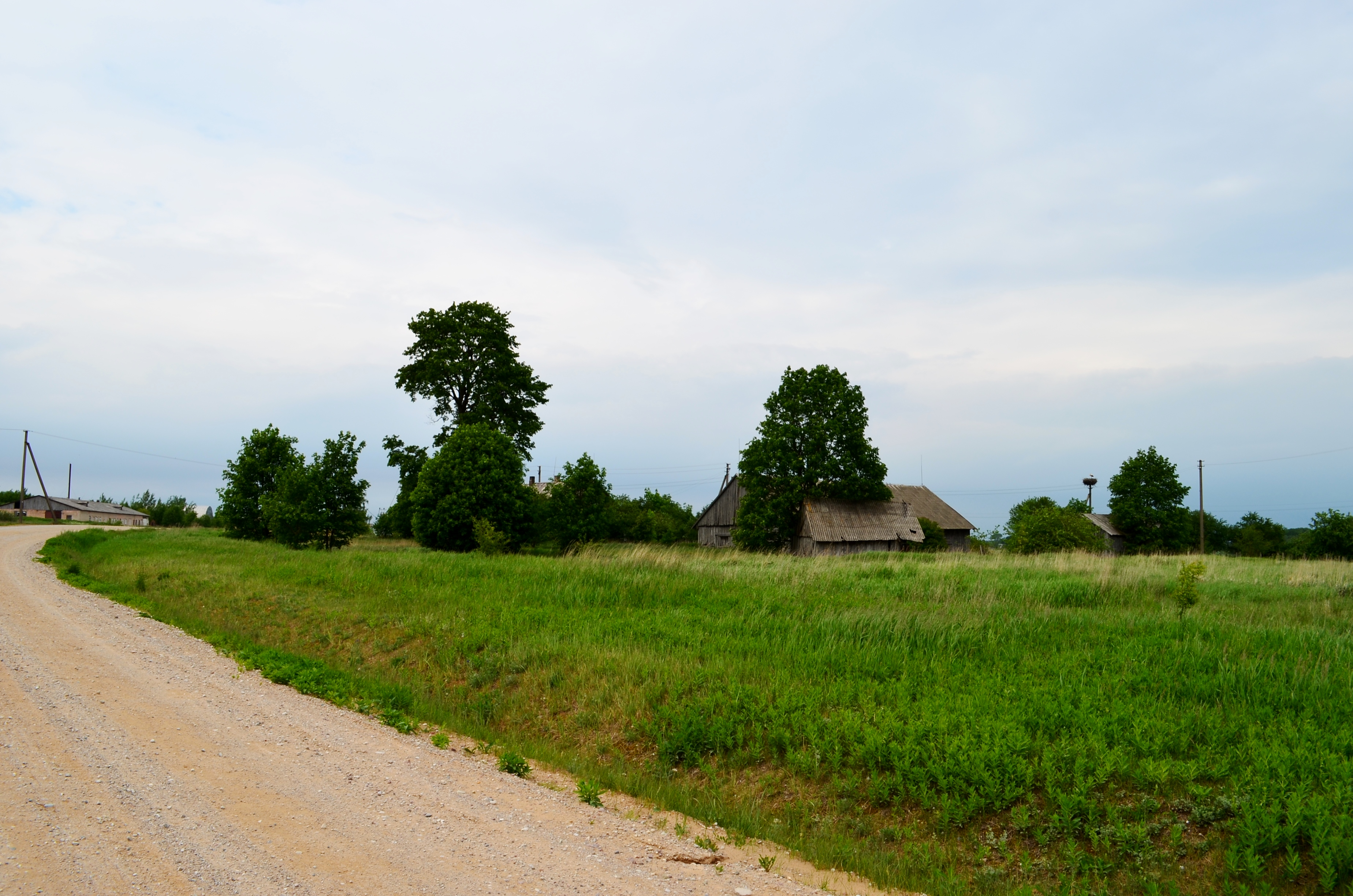 Meiliškiai, Raseinių r.